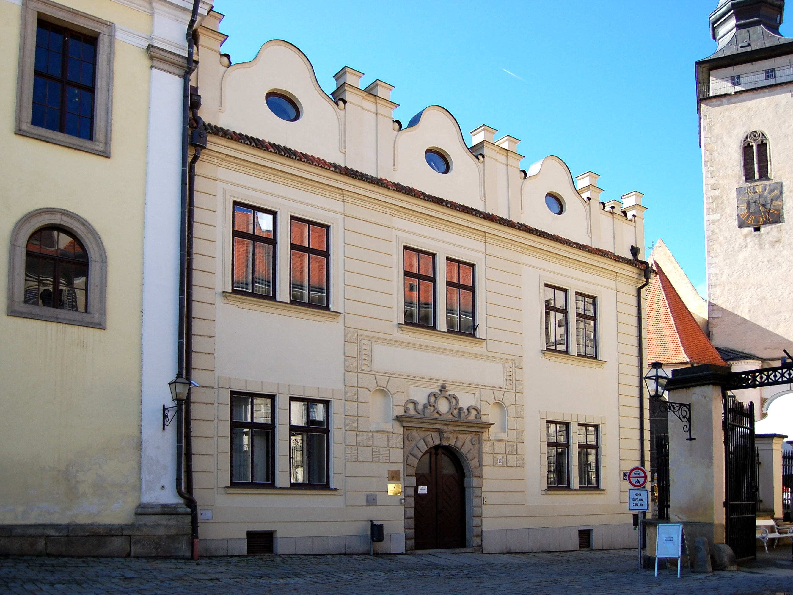 Kolej jezuitská (Telč), nám. Zachariáše z Hradce 2, Telč